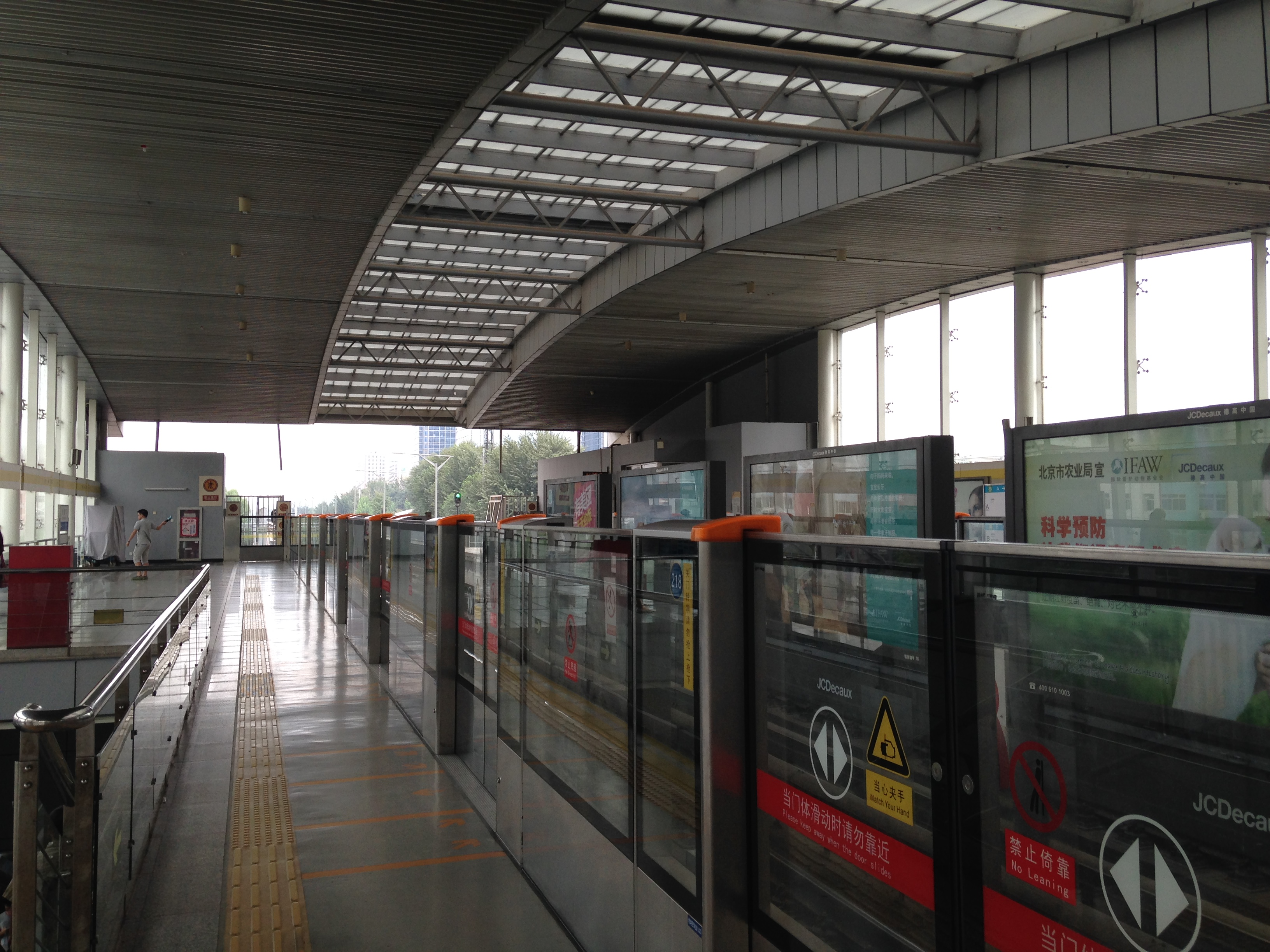 五道口駅のホーム